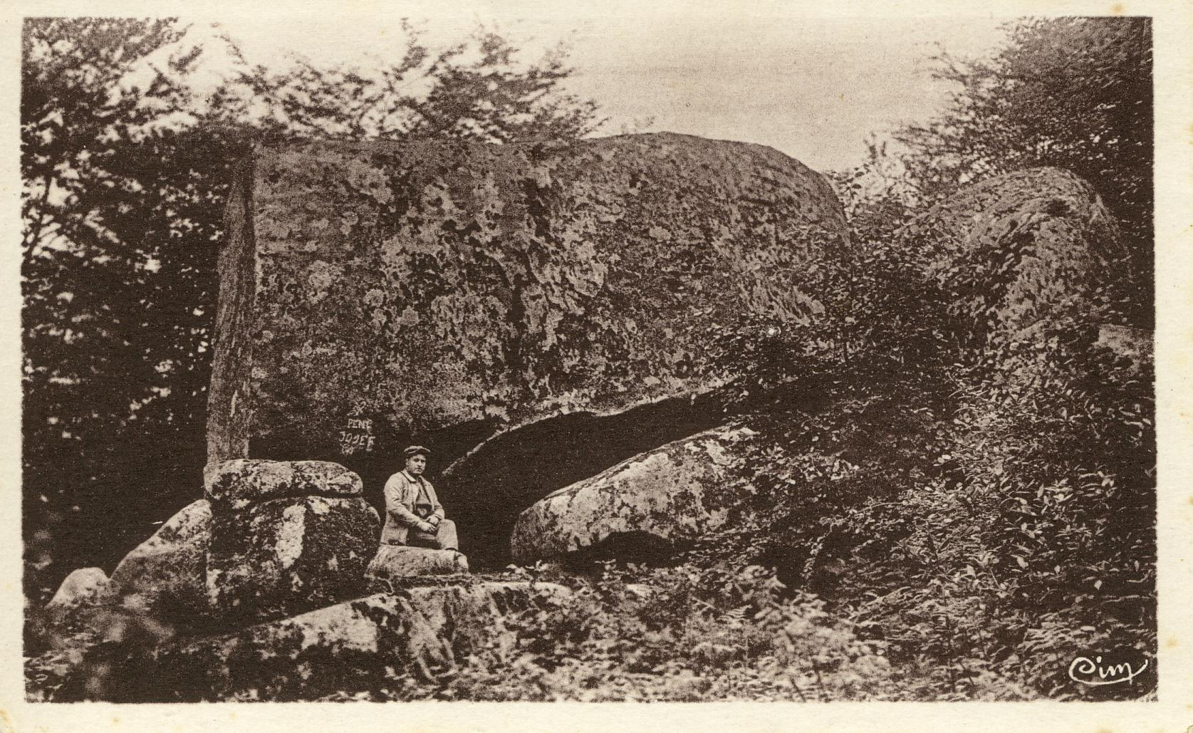 Ancienne carte postale du site de la Pierre coupée au Gast (Calvados). Scannerisation personnelle.